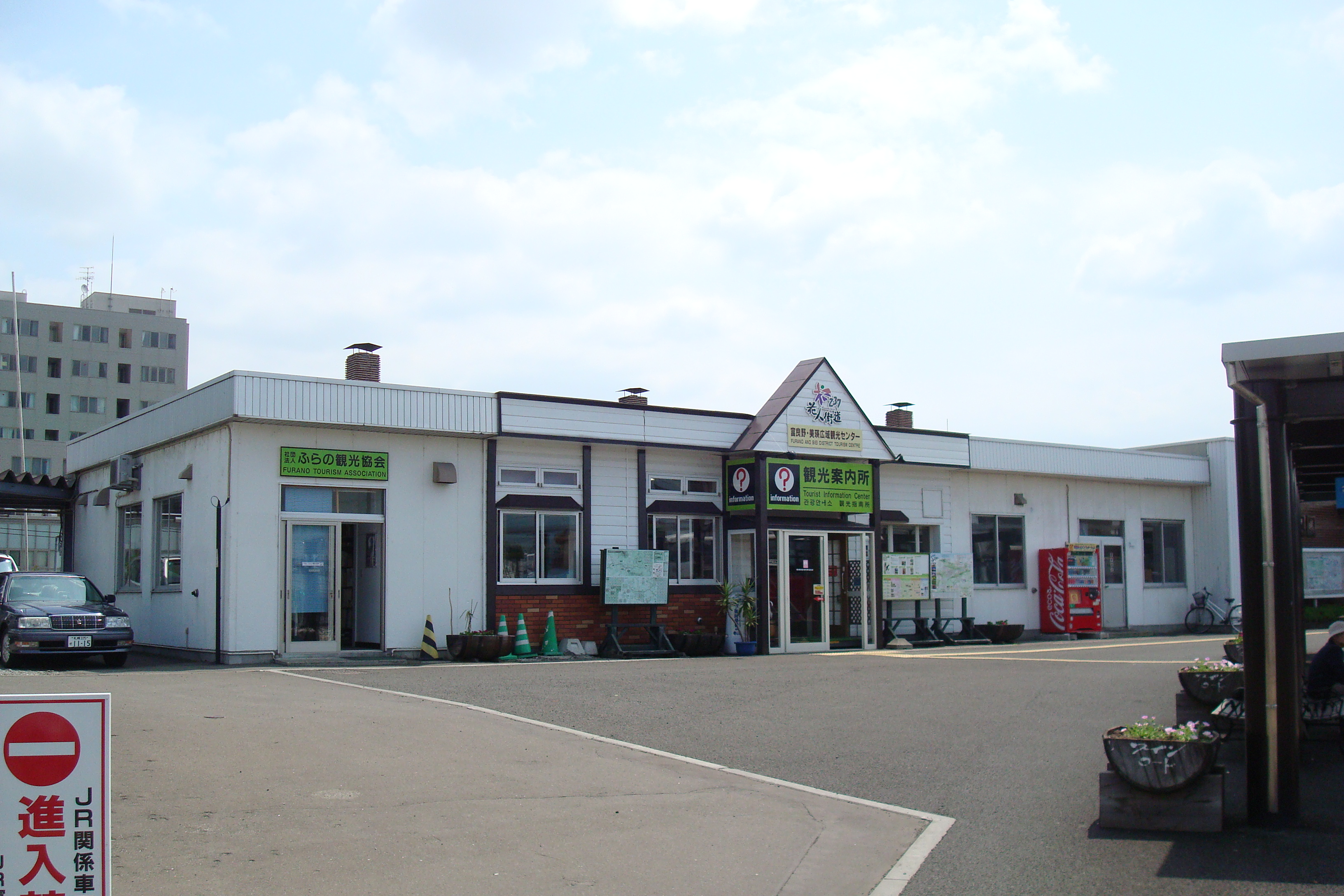 Furano Tourism Association in Furano, Hokkaido, Japan.